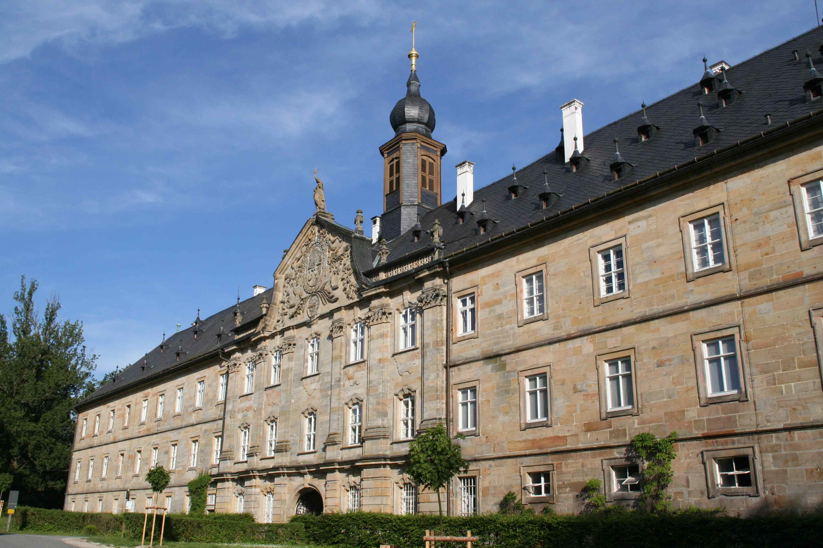 Schloss Tambach bei Coburg